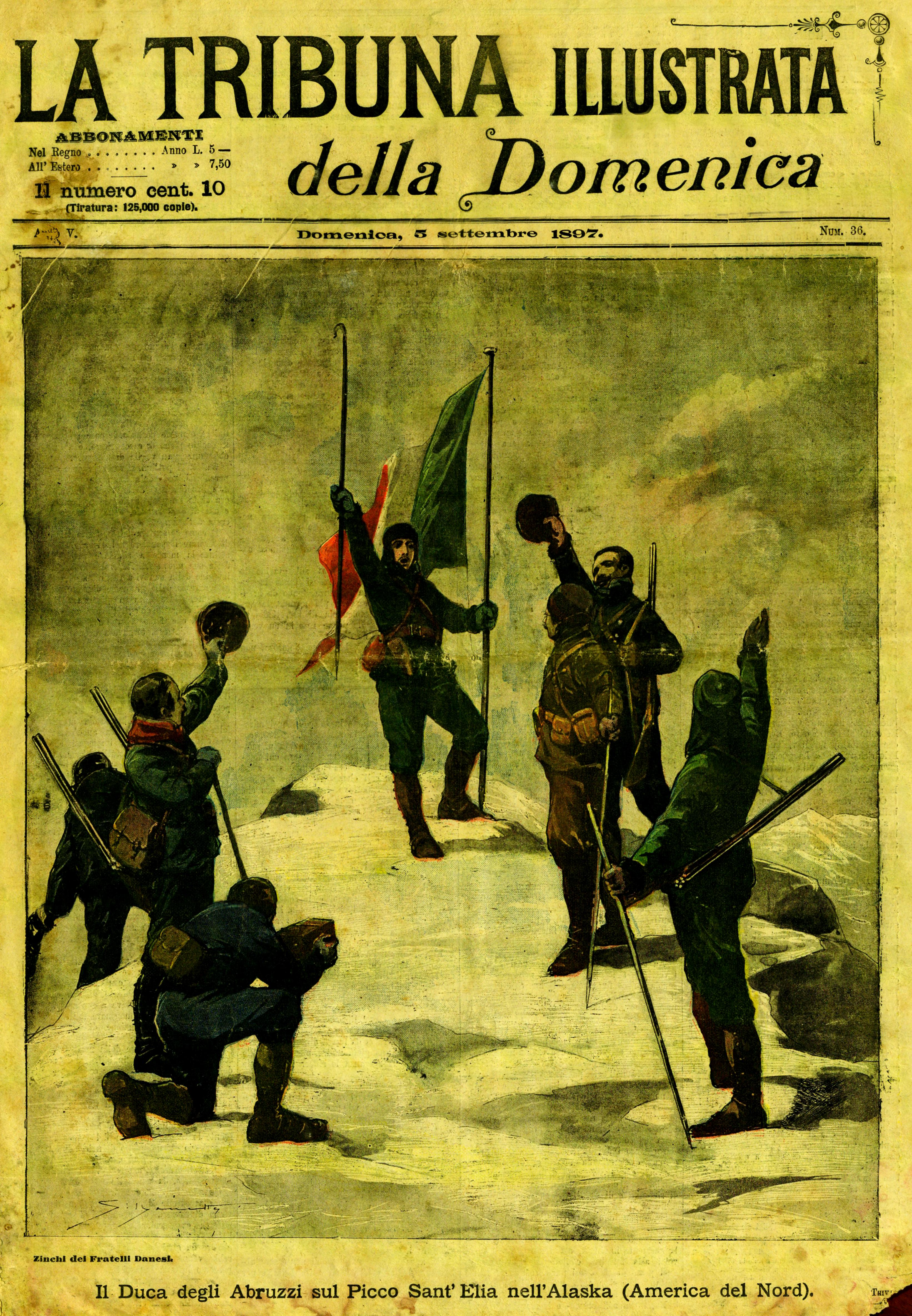 La Tribuna Illustrata della Domenica - Anno V n. 36 del 5 settembre 1897 - Il Duca degli Abruzzi sul Picco Sant'Elia nell'Alaska (America del Nord).